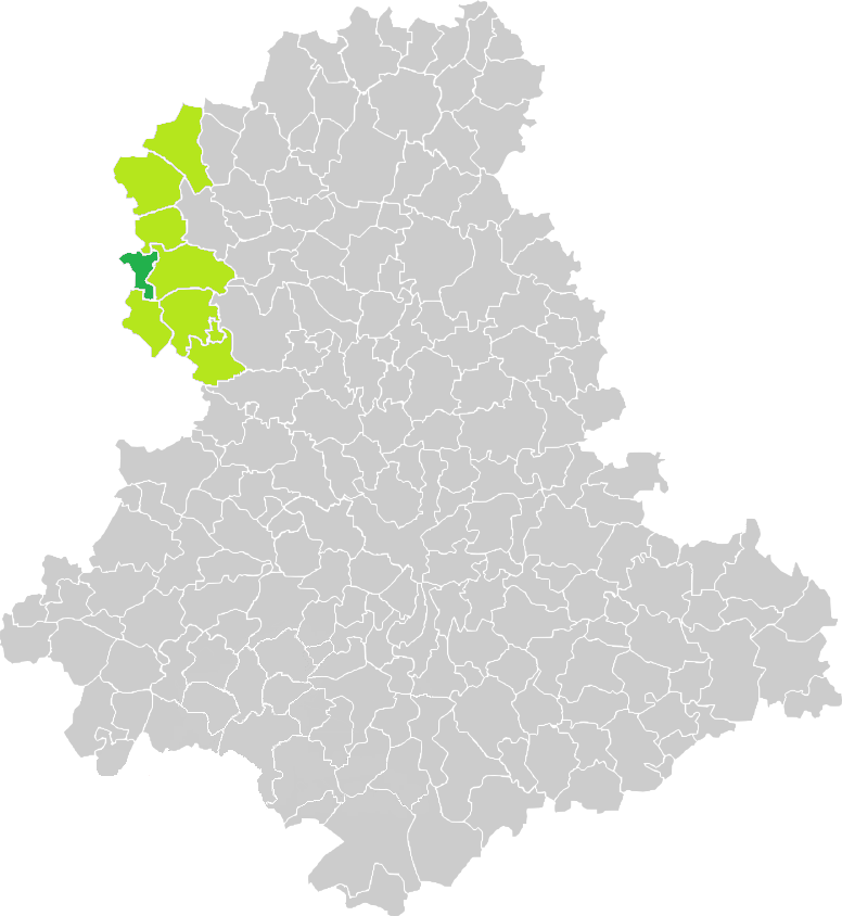 Carte de situation de la commune de Gajoubert (en vert foncé) dans le votre Canton (en vert clair) sur une carte des communes de la Haute-Vienne